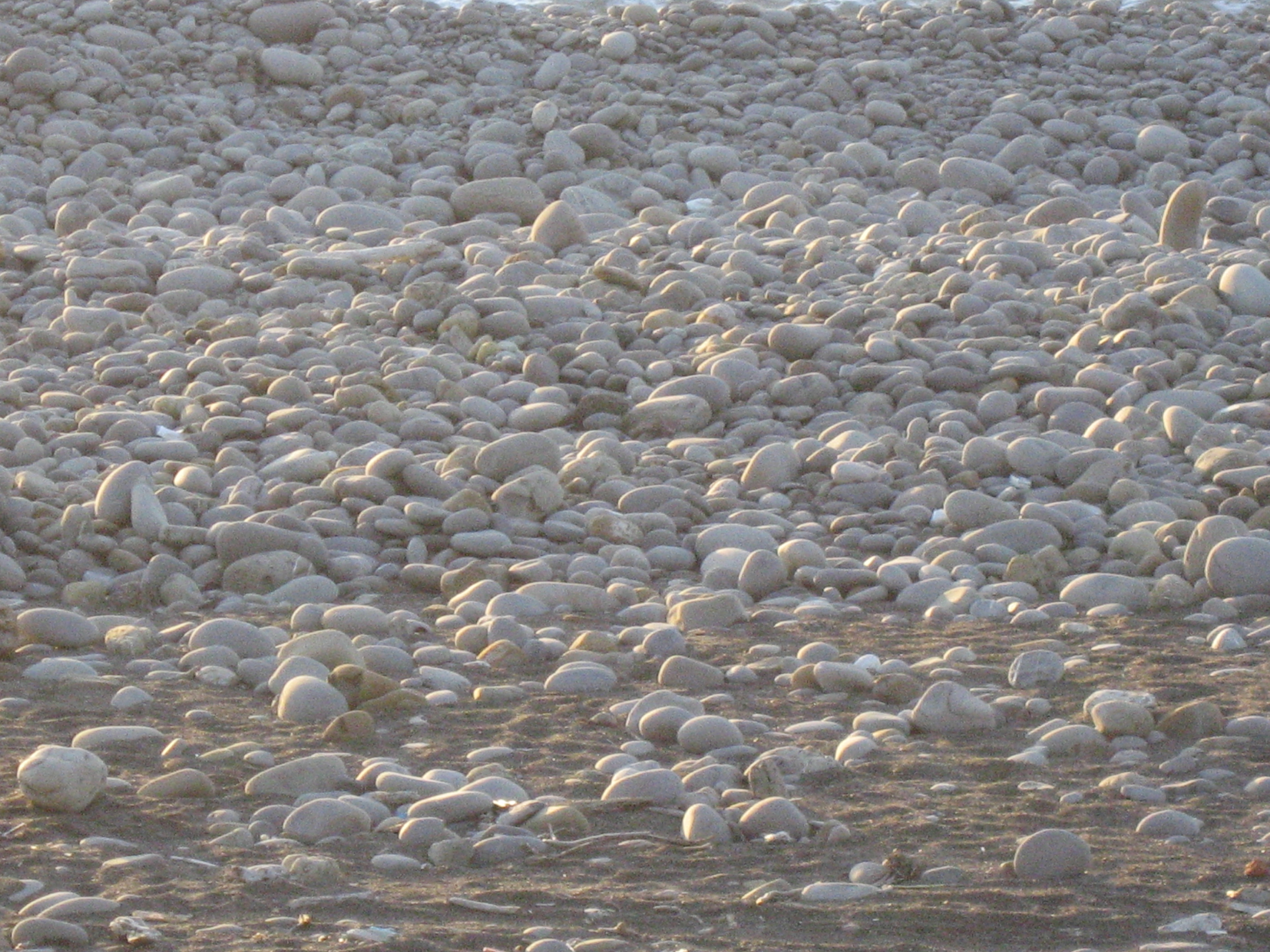 中文（台灣）: 南田村海岸的南田石。